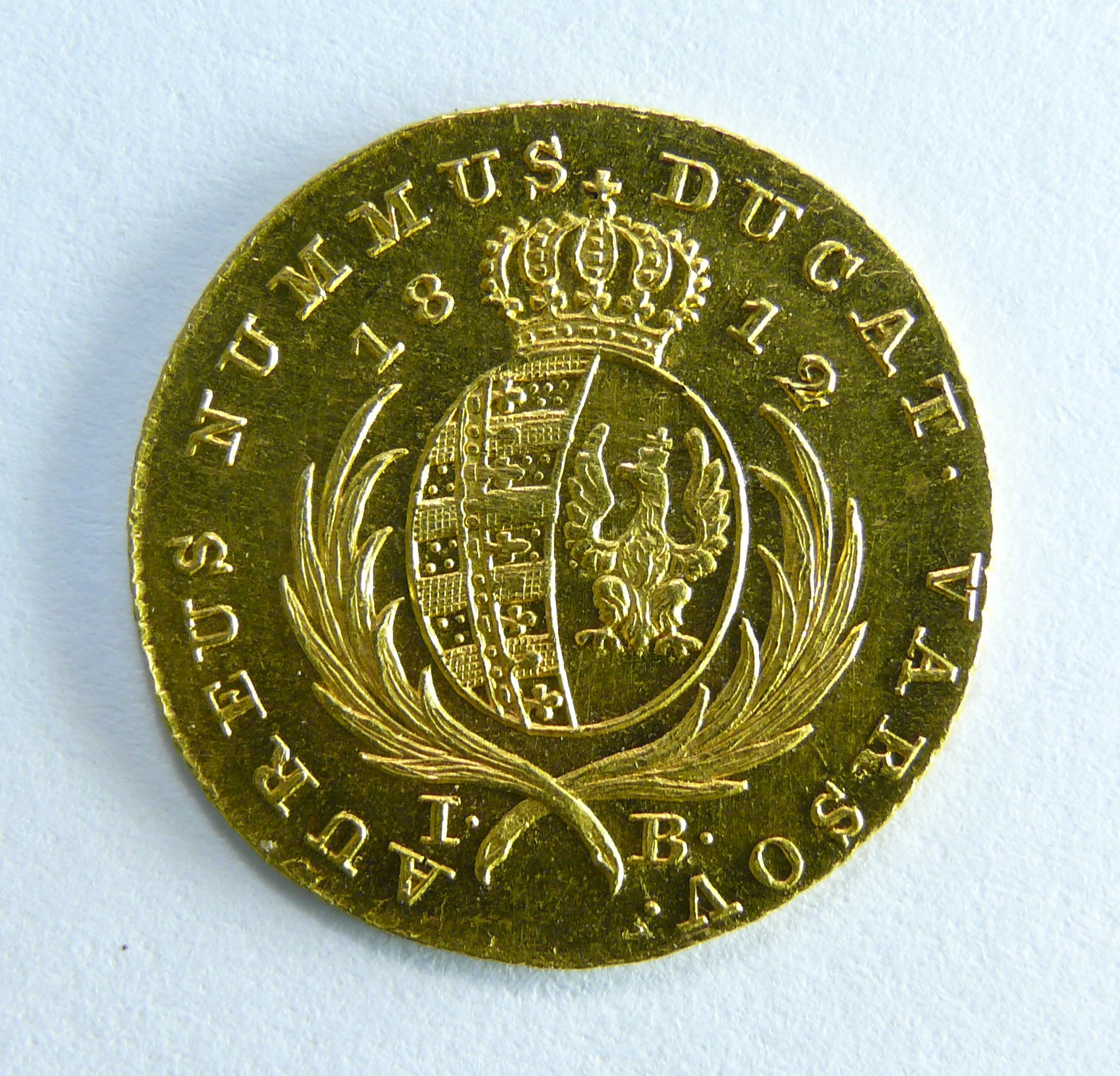 Księstwo Warszawskie, Dukat (18 złotych), Mennica w Warszawie, 1812, Złoto, bity, Śr. 22, 2 mm; waga 3,49 g